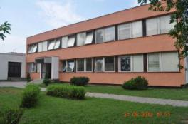 Základna školka sv. Marka